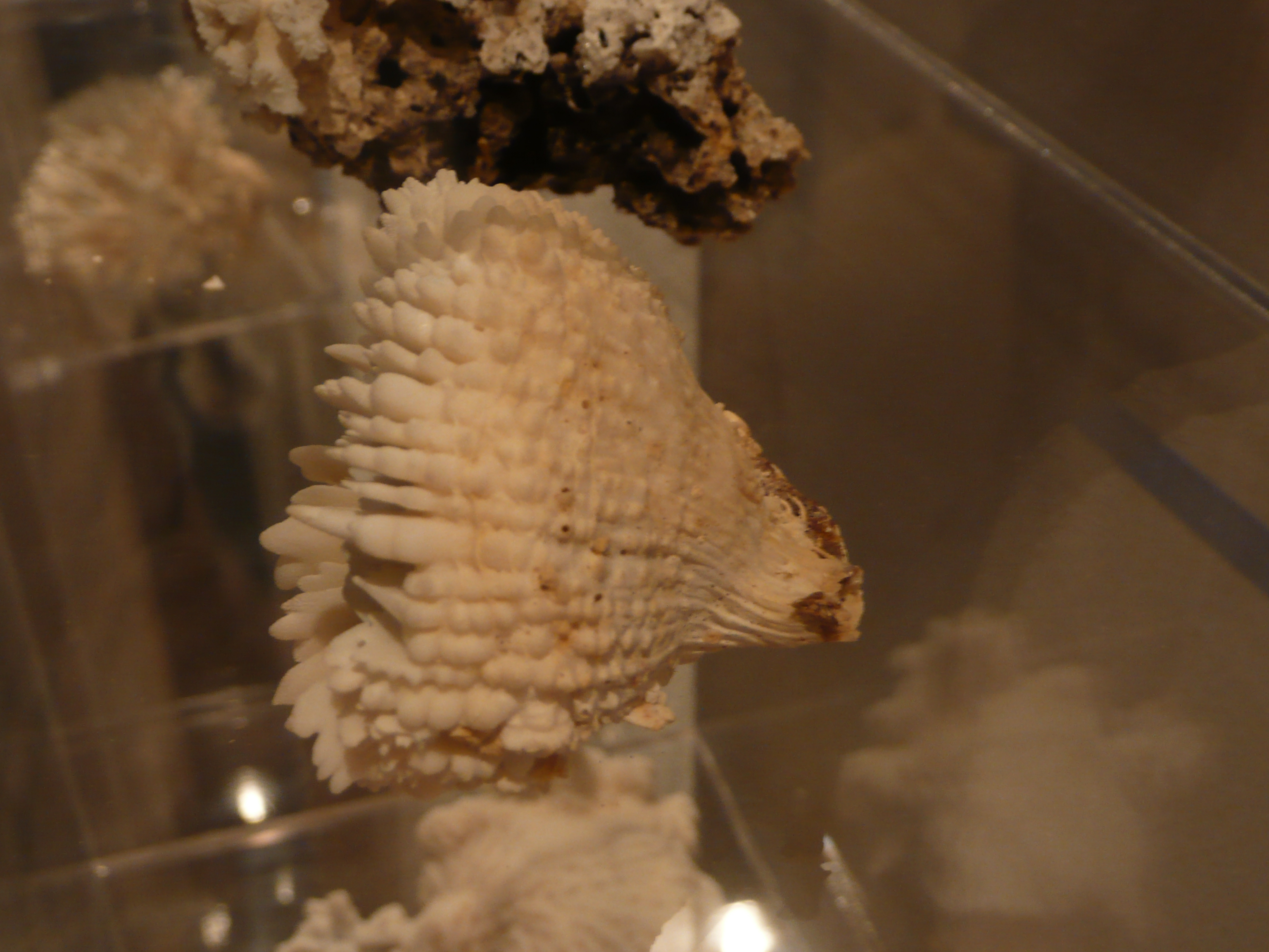 Cynarina lacrymalis in Aquarium tropical du Palais de la Porte Dorée